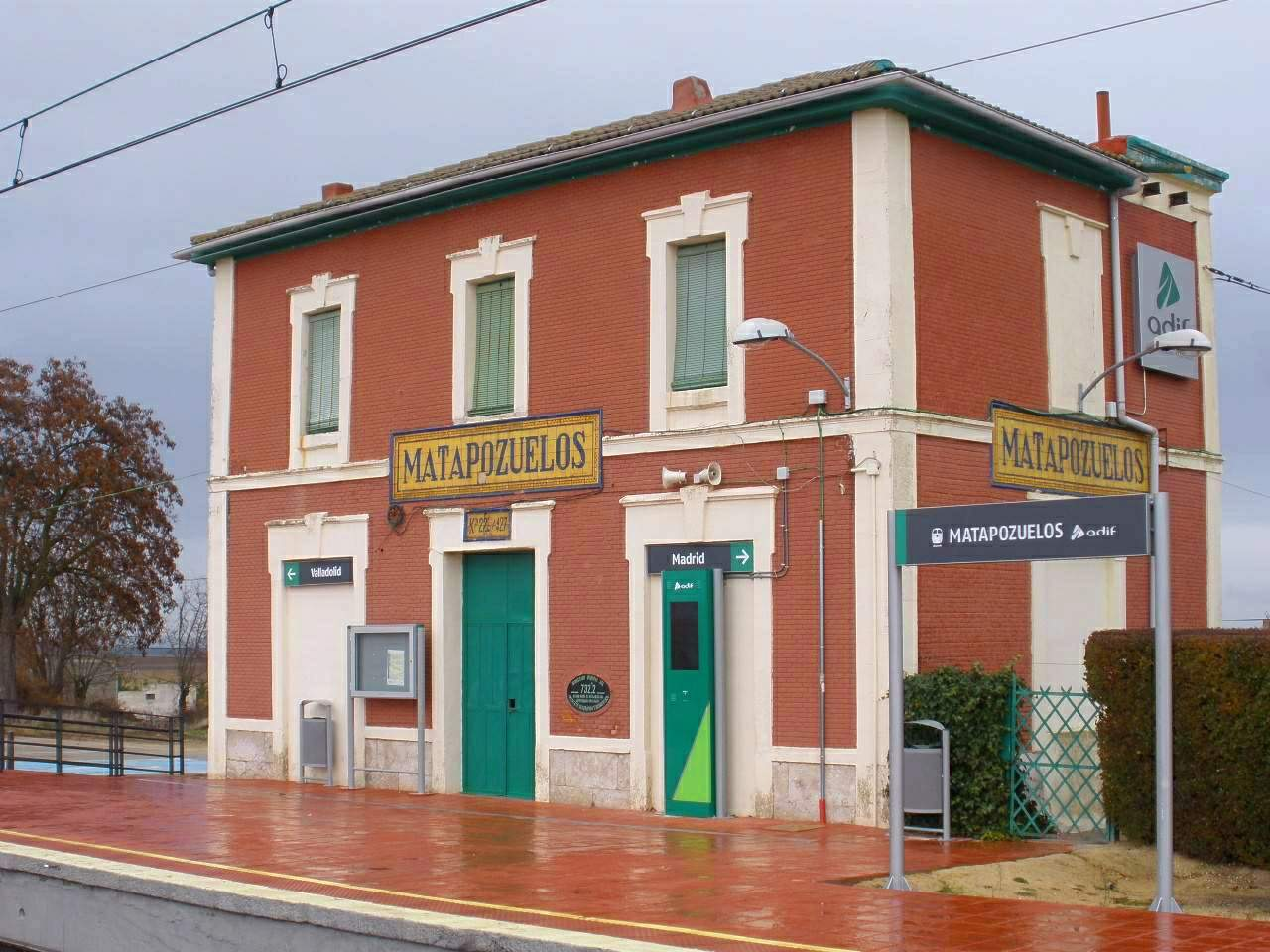 Estación de tren de Matapozuelos (provincia de Valladolid).